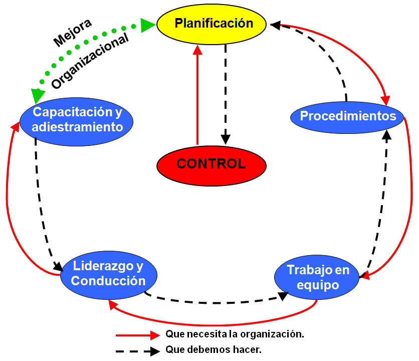 Procesos cíclico sistémico para la mejora organiazcional.